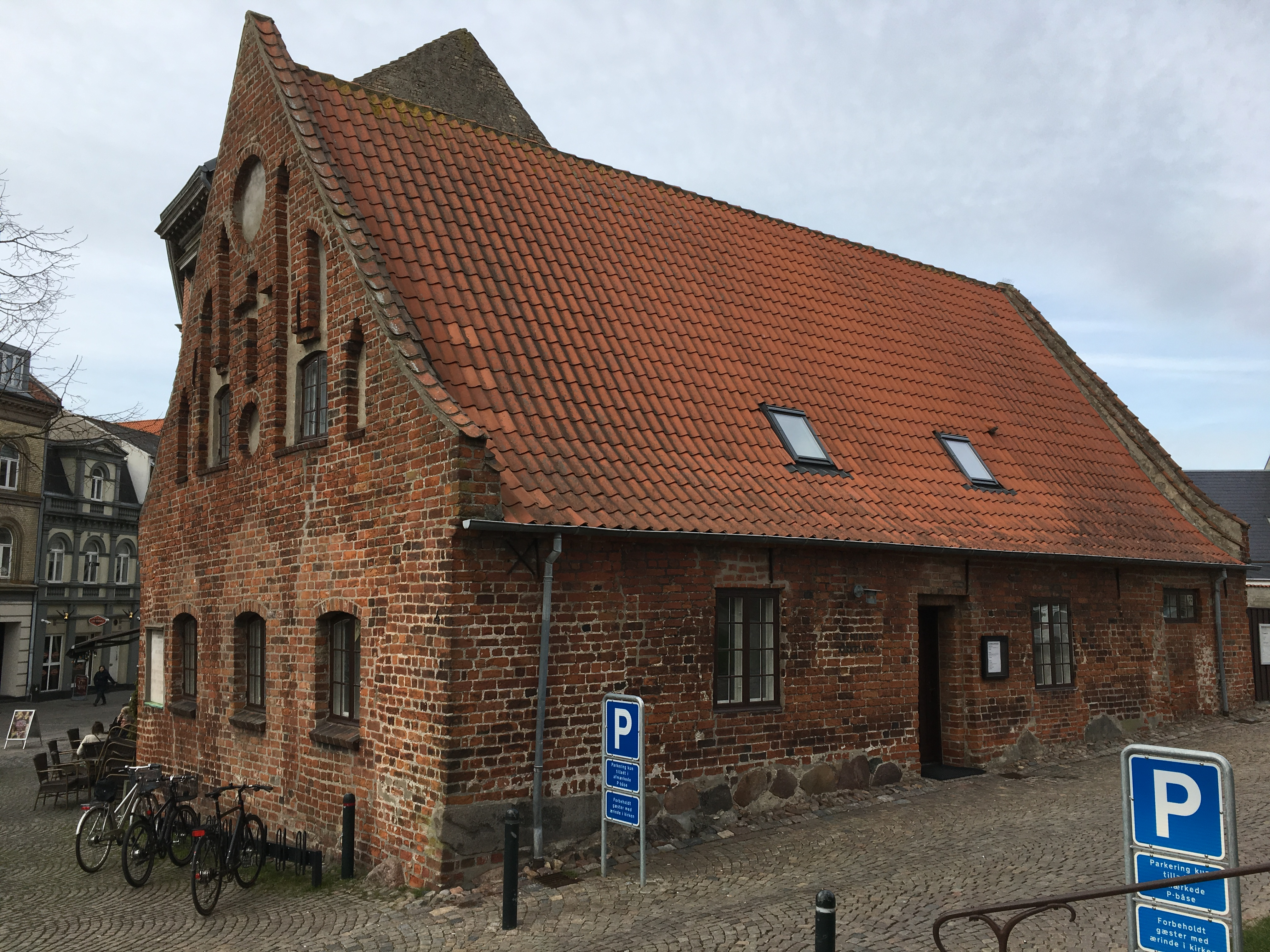 Latinskolen i Slagelse